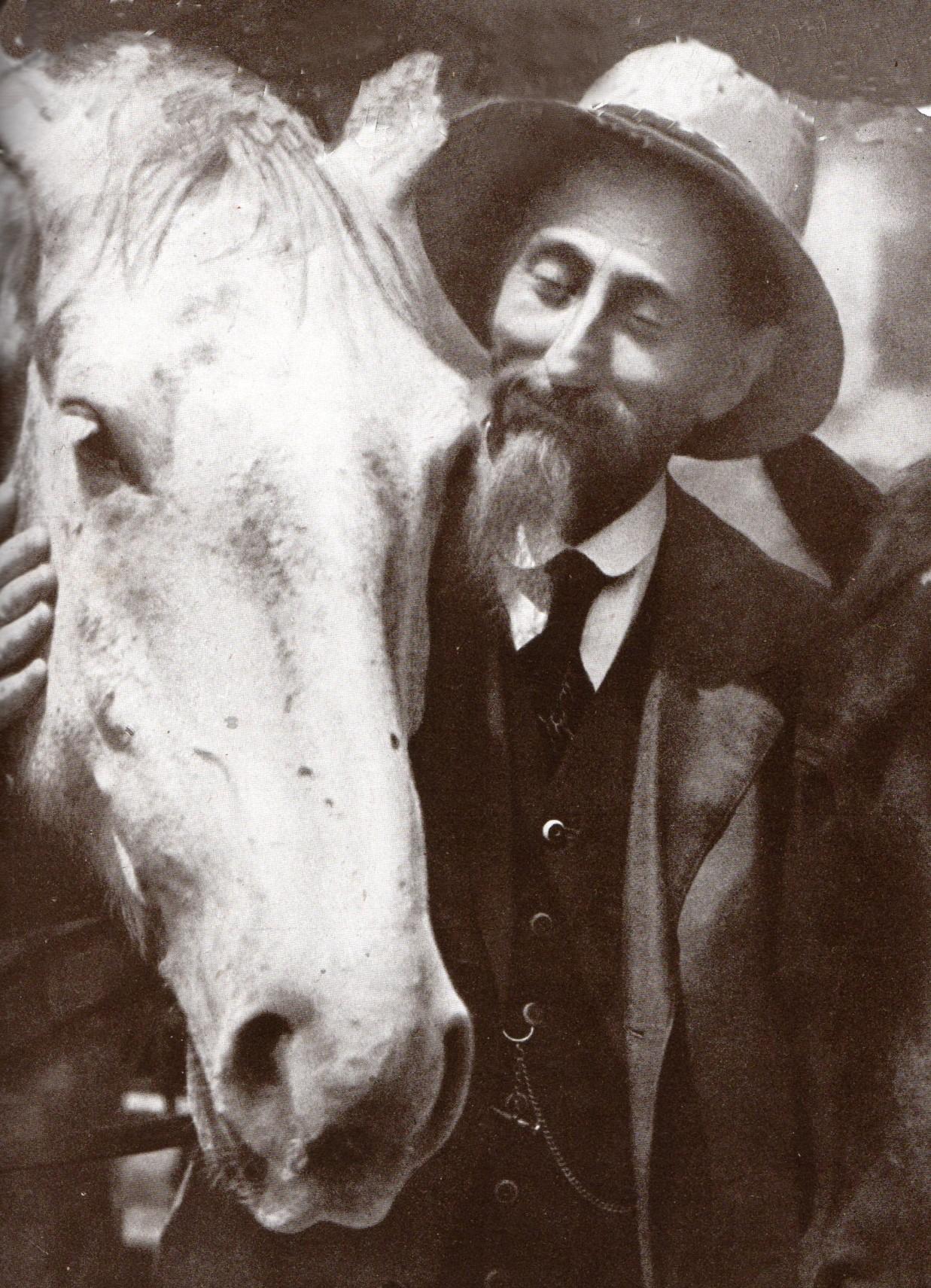 Jindřich Plachta (Host do domu, 1941)